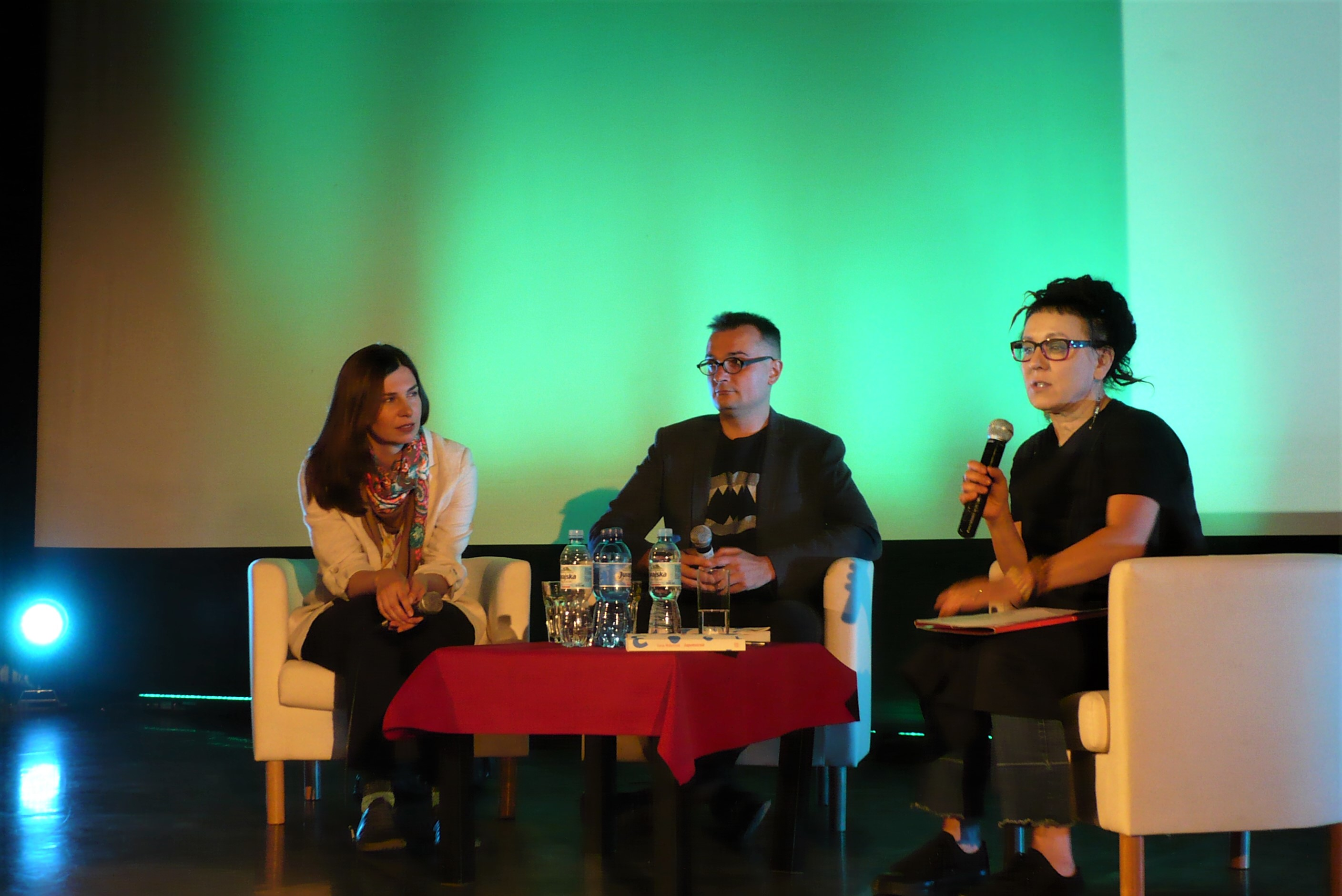 Tania Malarczuk, Festiwal Góry Literatury, Nowa Ruda, 2019